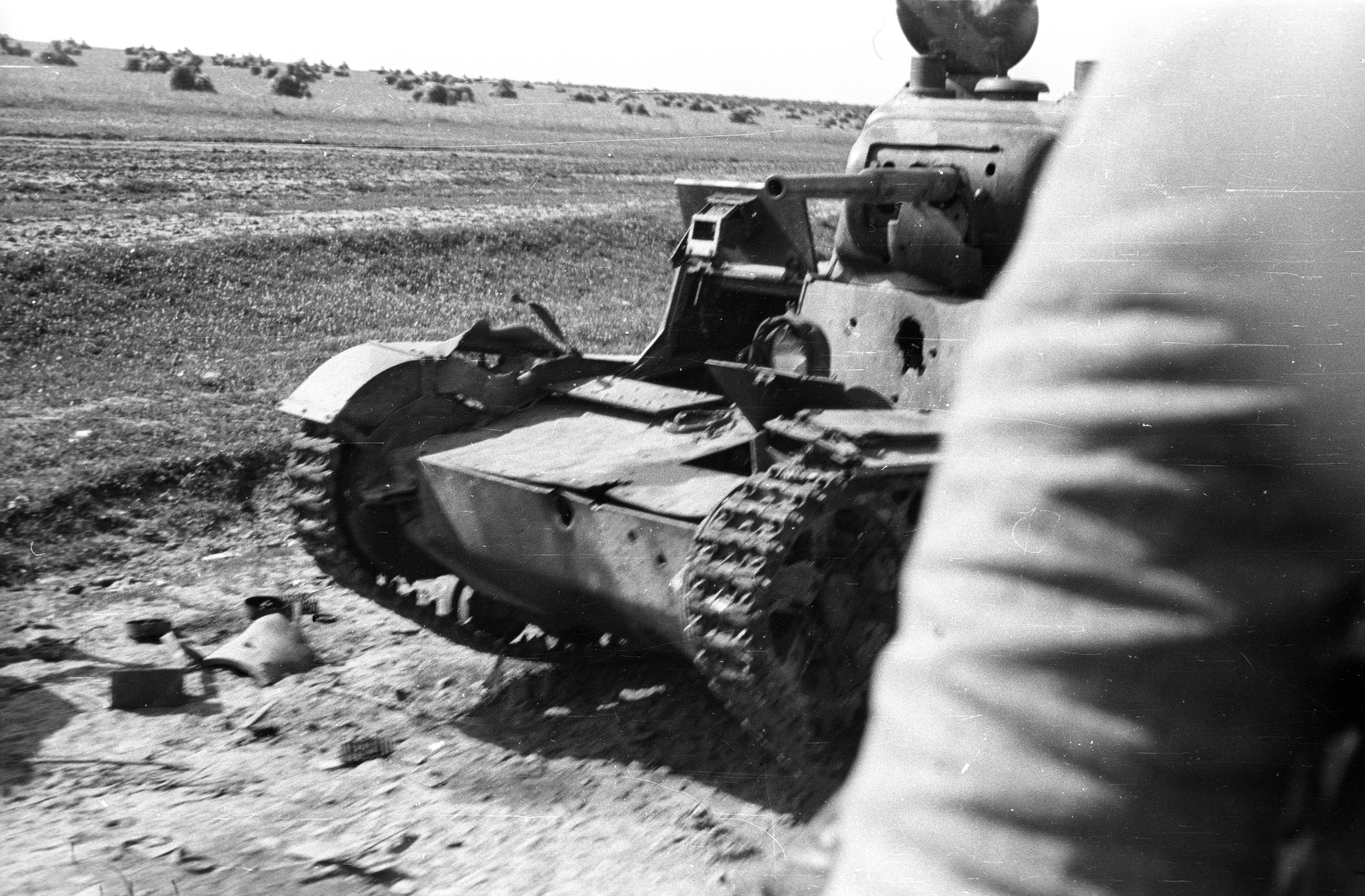 kilőtt T-26-os harckocsi a Kamenyec-Podolszk és Tulcsin közötti úton. Location: Ukraine Tags: tank, Soviet brand, wreck Title: kilőtt T-26-os harckocsi a Kamenyec-Podolszk és Tulcsin közötti úton.